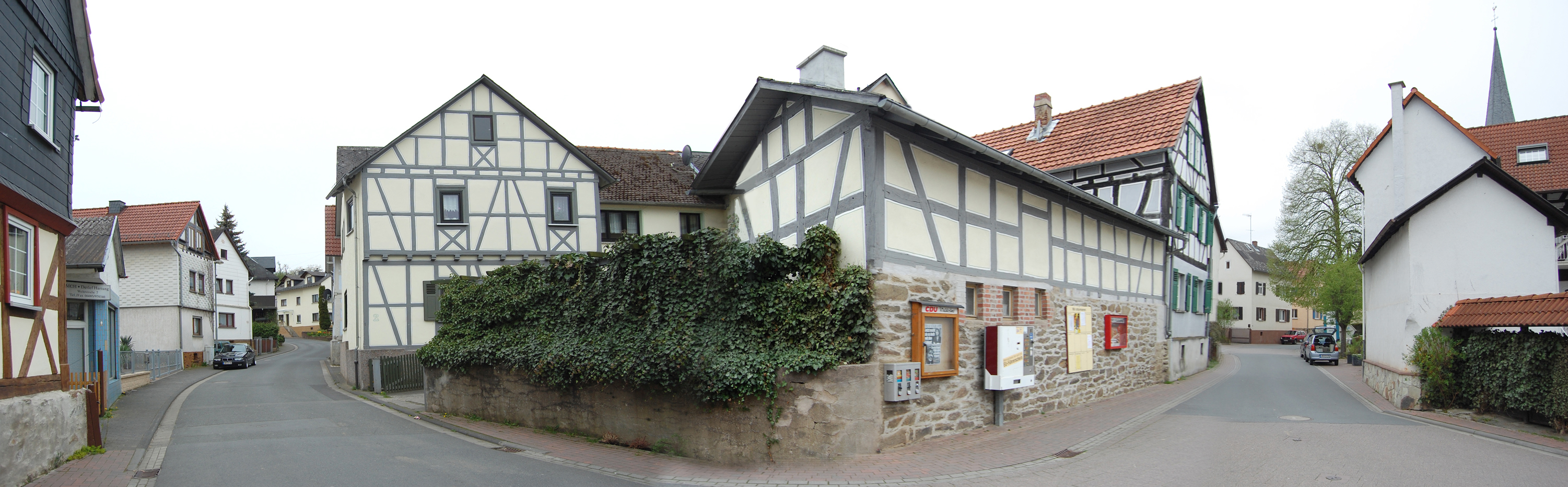 Waldsolms, Ortsteil Kraftsolms, Solmserstraße Ecke Wehrstraße